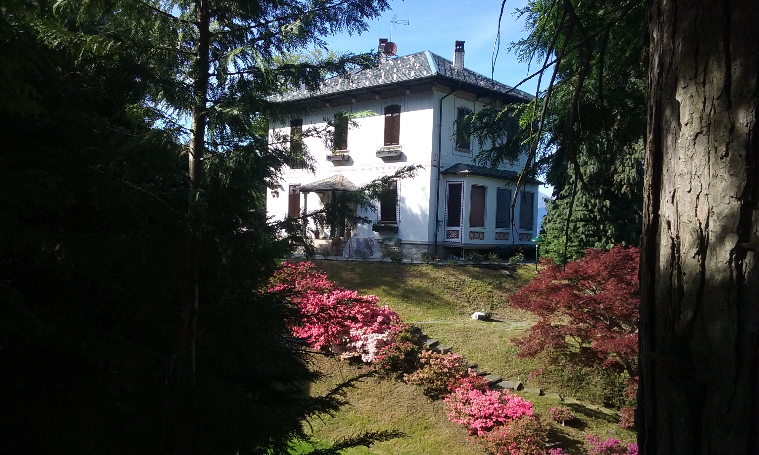 Località Alpino Villa Talamona